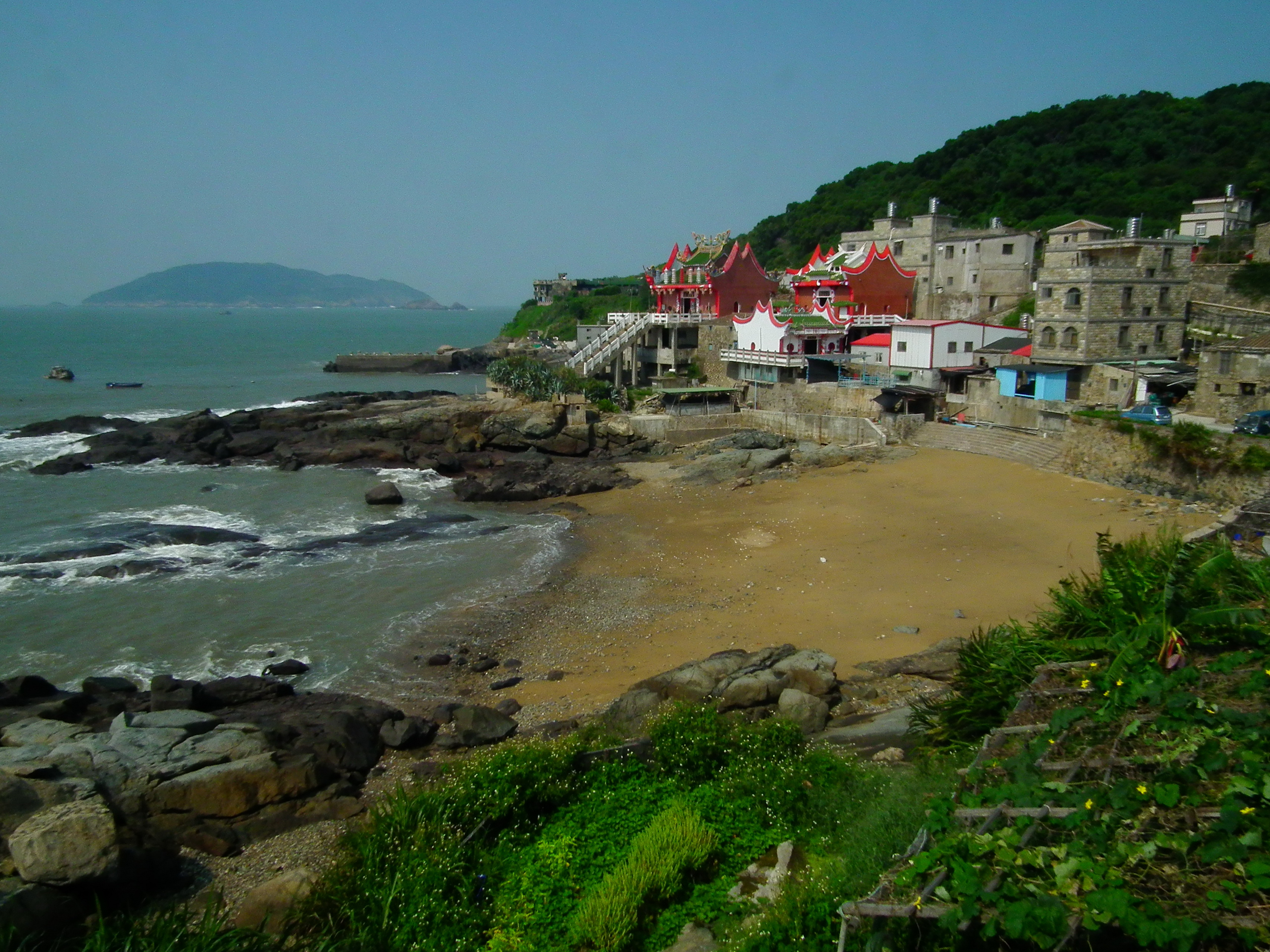 北竿橋仔村 Beigan Qiaozai Village